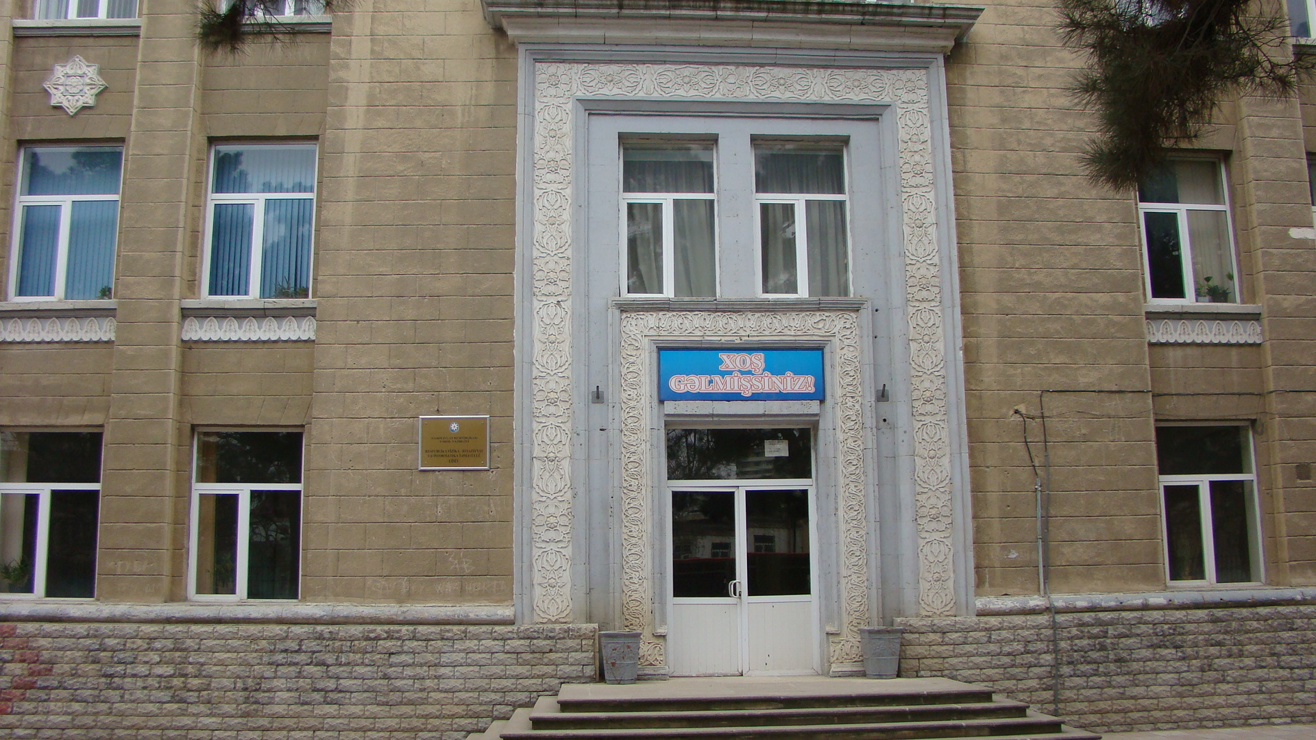 Fizika, Riyaziyyat və İnformatika Təmayüllü Liseyin əsas binası